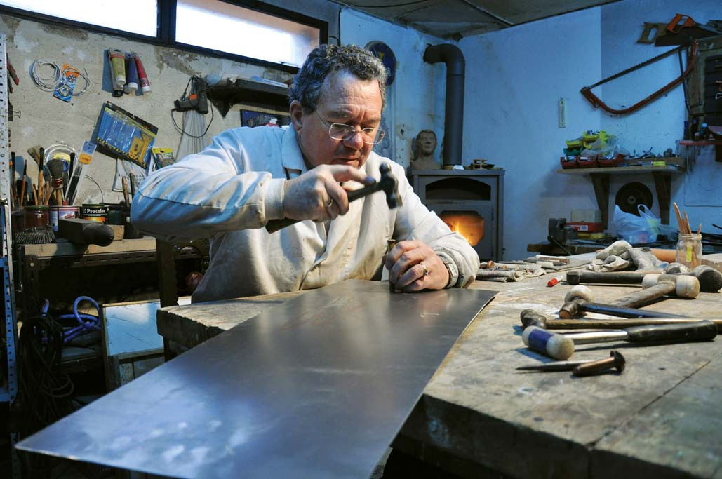 El artista Guillermo Benito trabajando en su estudio en una de sus obras de repujado en hierro.